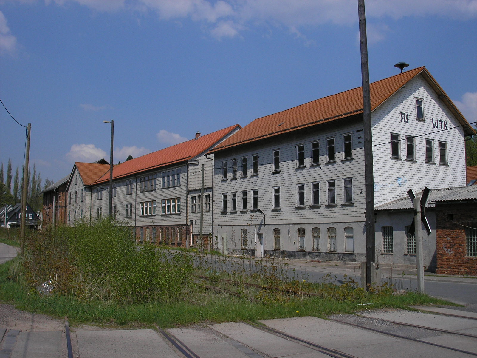 Ehem. Porzellanfabrik Schlegelmilch am Oberweg in Langewiesen (Thüringen).